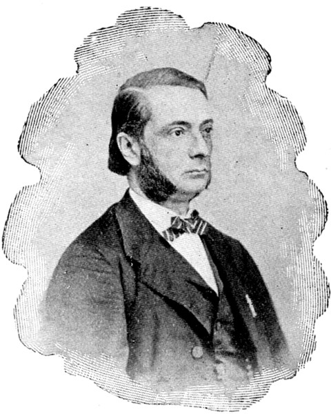 Domenico Tarsitani (1817-1873)